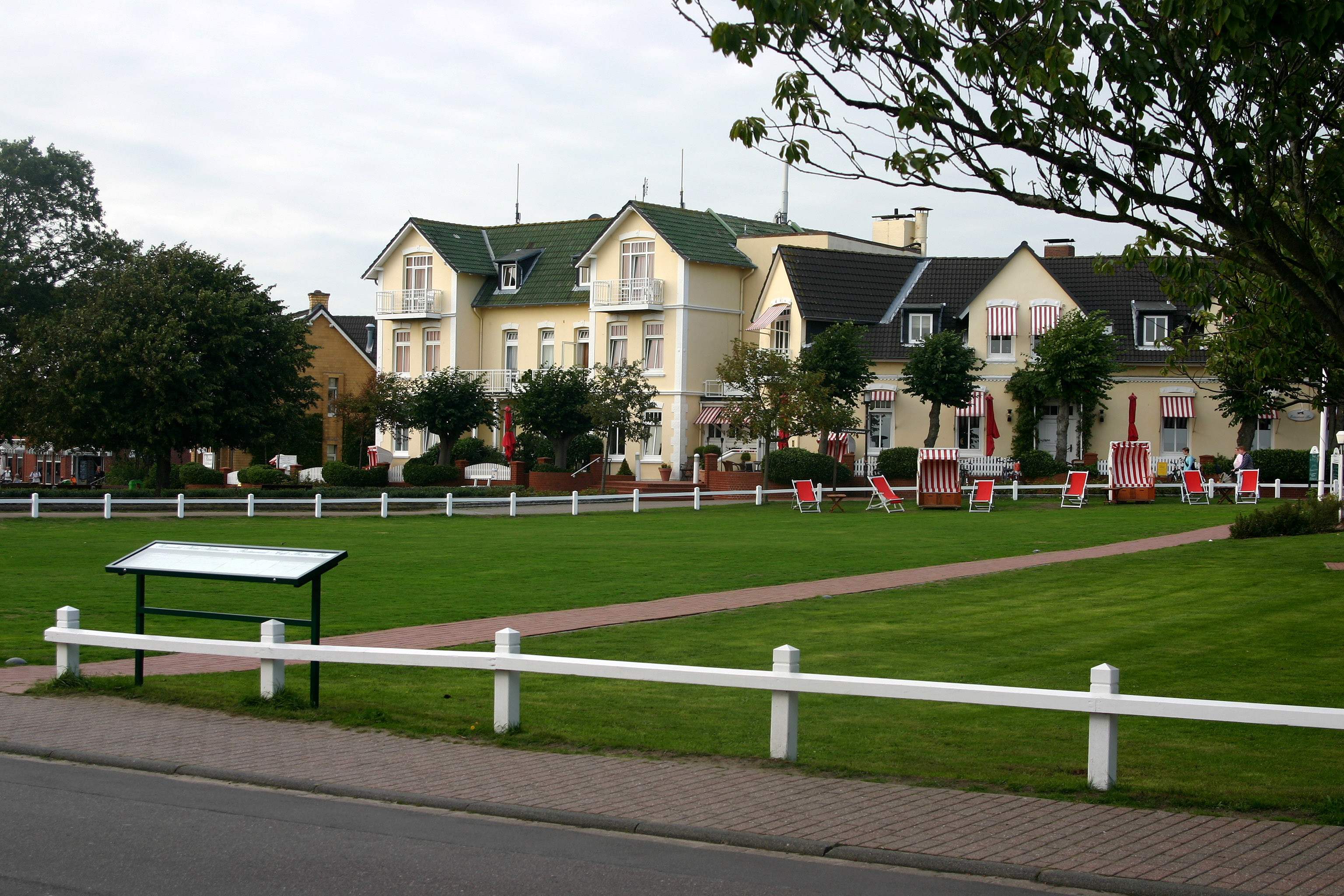 Kurpark im Ortszentrum von Norddorf (Insel Amrum) mit Hotel Hüttmann